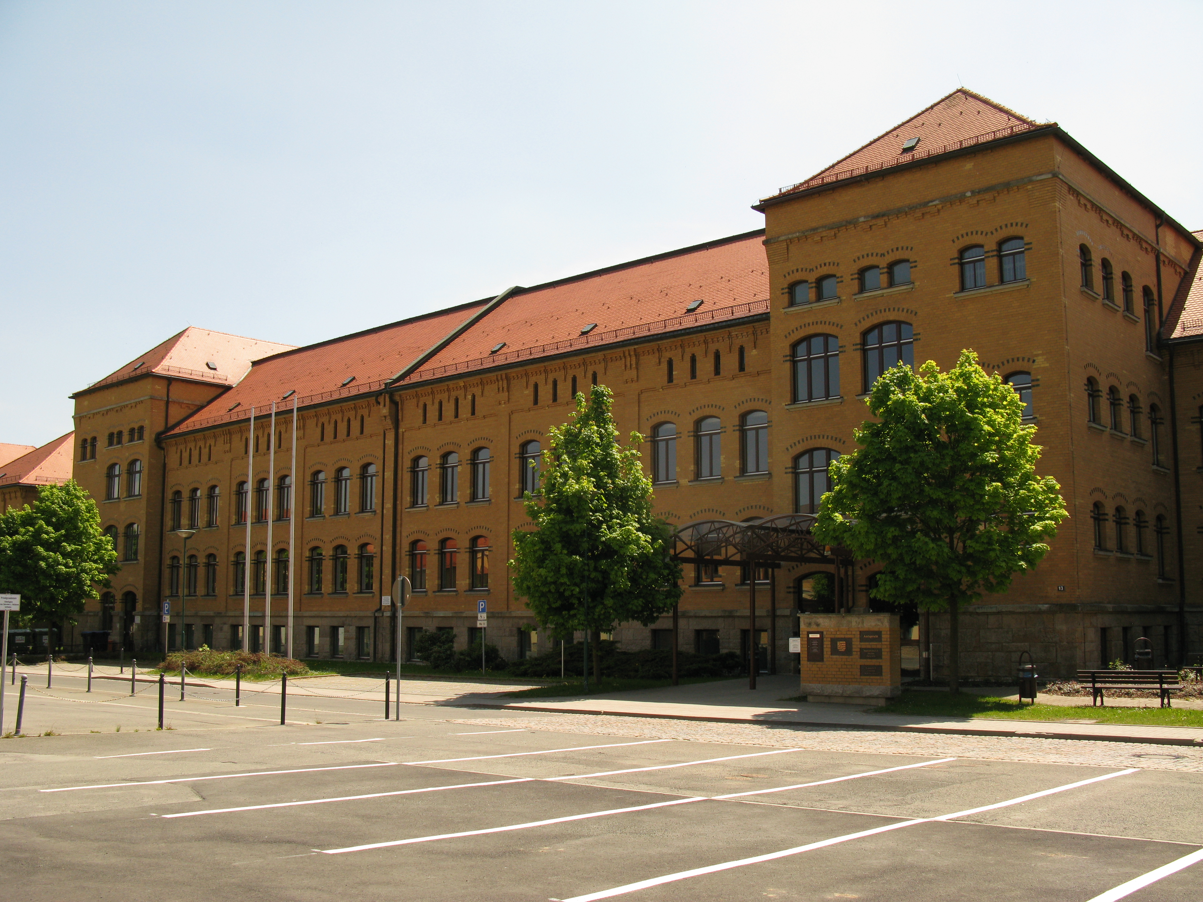 Plauen, Europaratstraße 13. Gebäude der ehemaligen Kaserne des 10. Infanterie-Regiment No. 134. Heute Zentraljustizgebäude mit Amtsgericht Plauen, Grundbuchamt, Staatsanwaltschaft Zwickau (Zweigstelle), Landgericht Zwickau (Außenkammer).